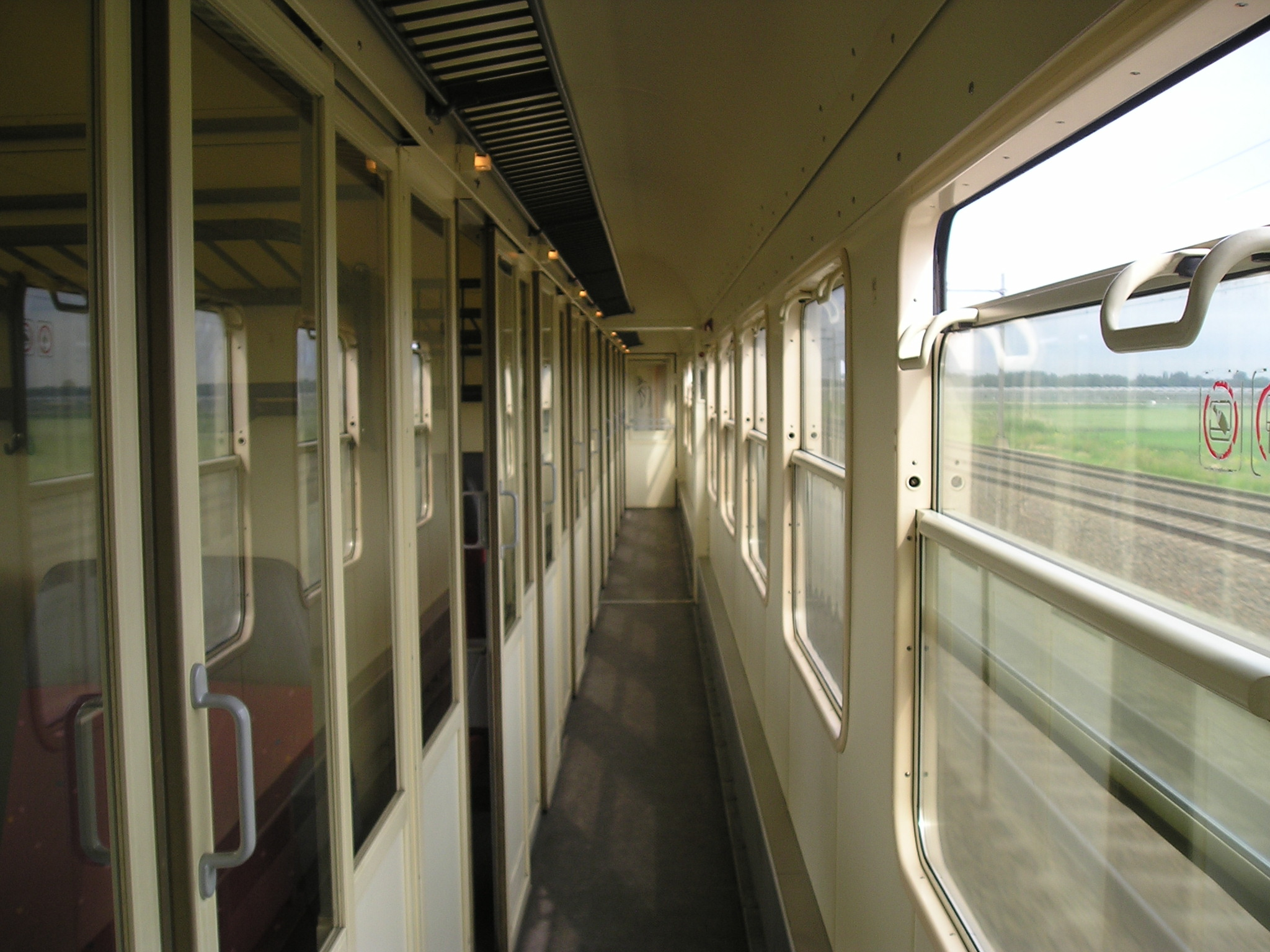 Interieur ICK